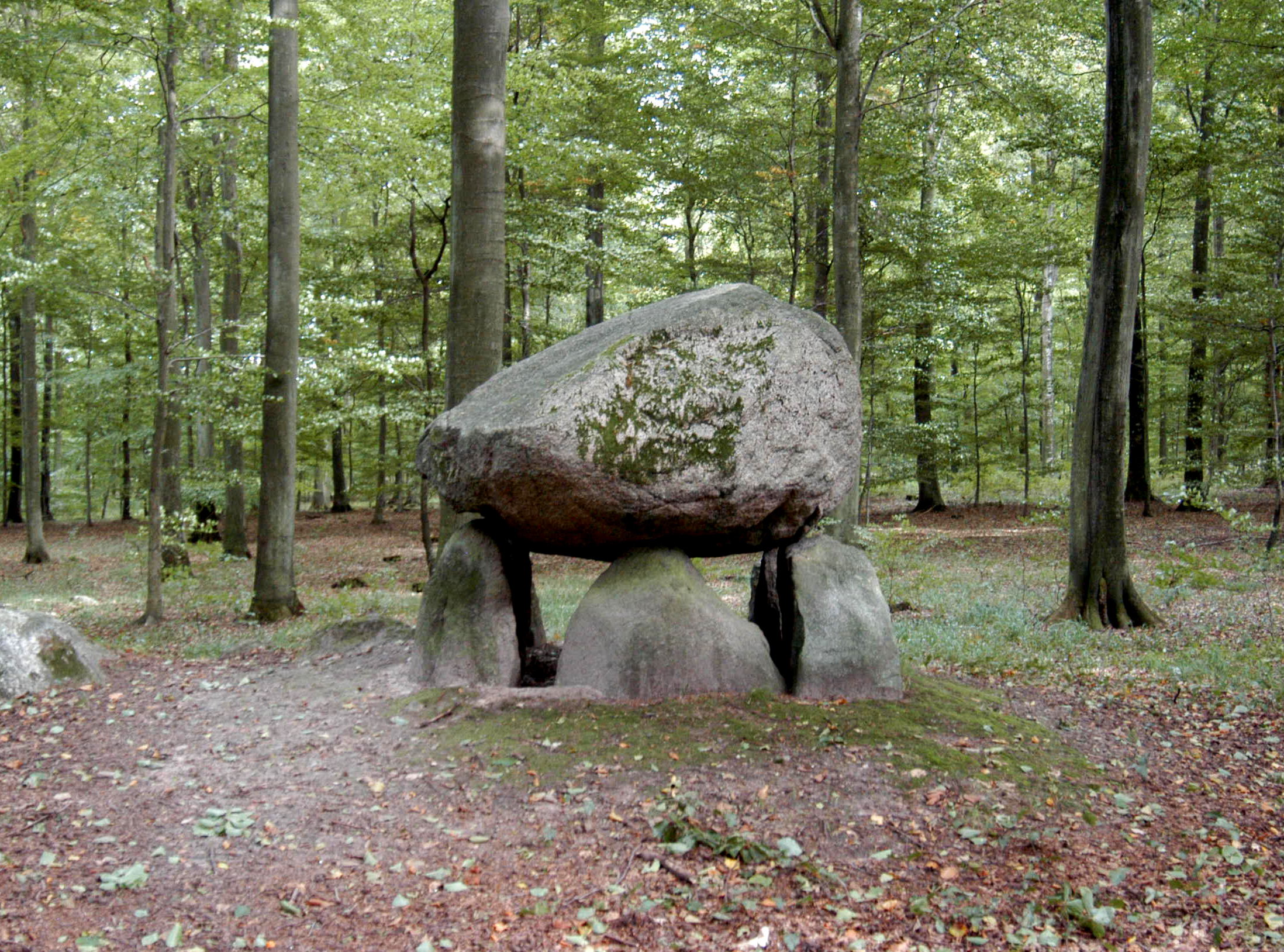 Dolmen in denmark (klosterisegn)-Hornbæk-North Zealand